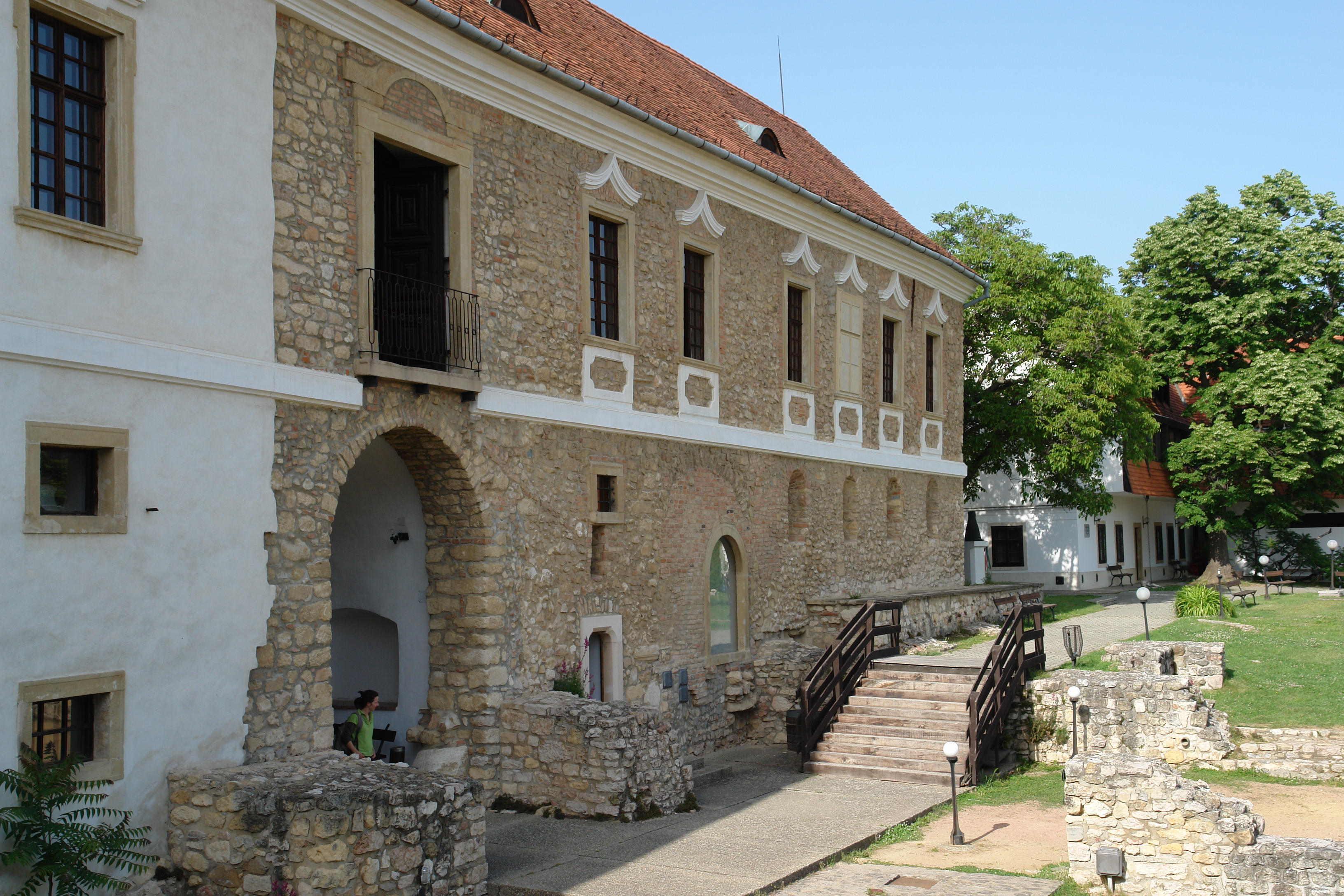 Pécsvárad1 This is a photo of a monument in Hungary. Identifier: 13541